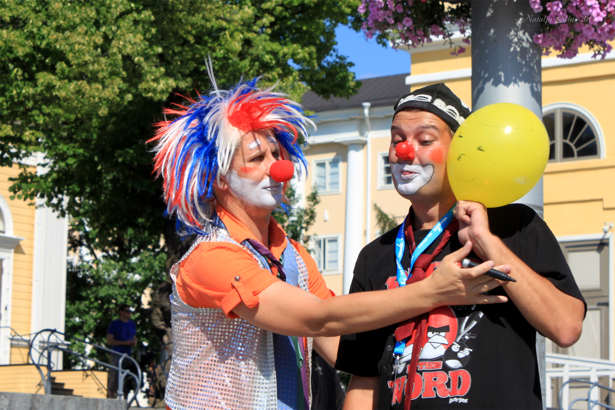 Спектакль «Галилей». Театр «Две обезьяны»